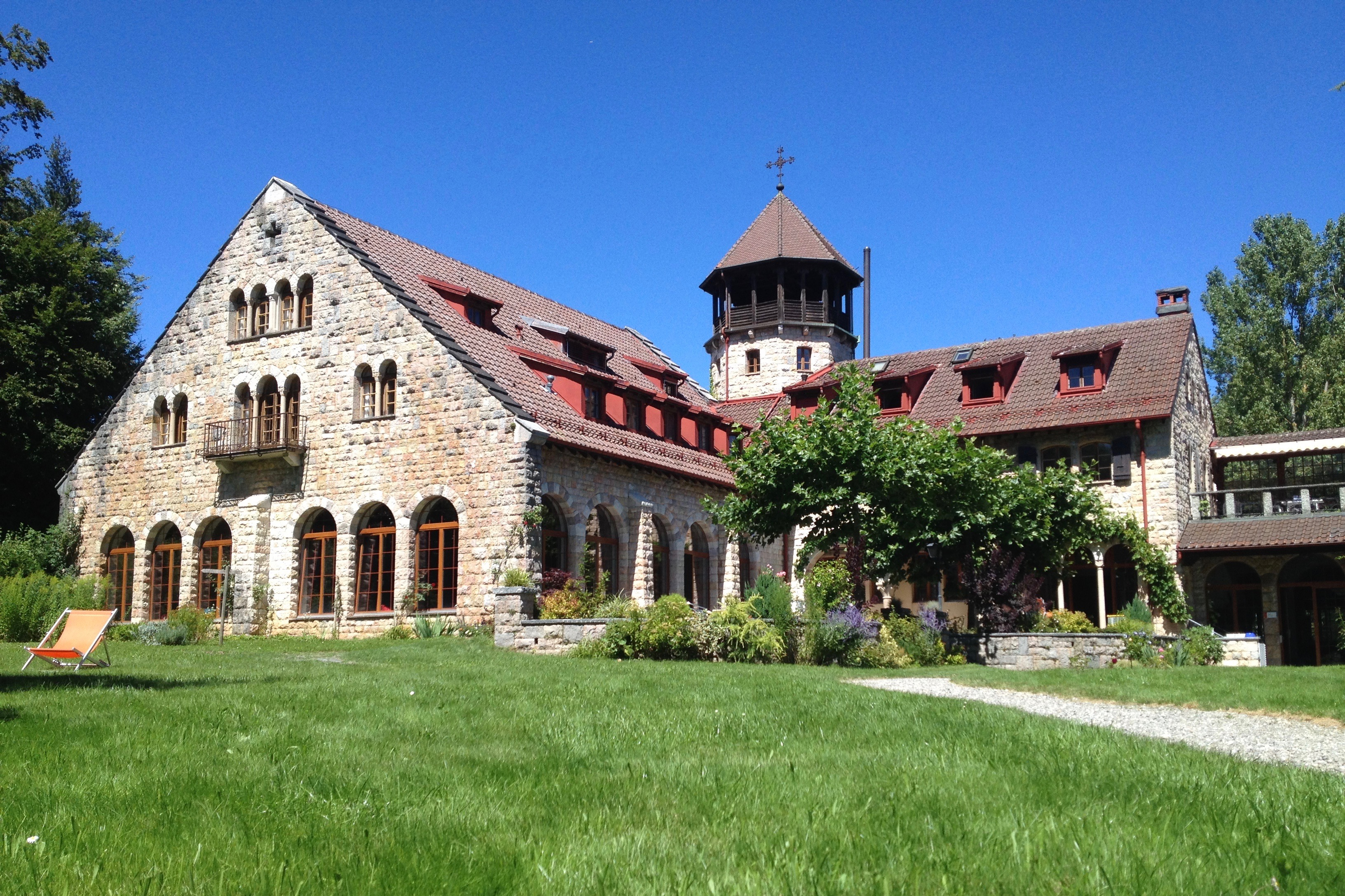 Crêt-Bérard, Maison de l'Eglise et du Pays (Puidoux, Suisse)